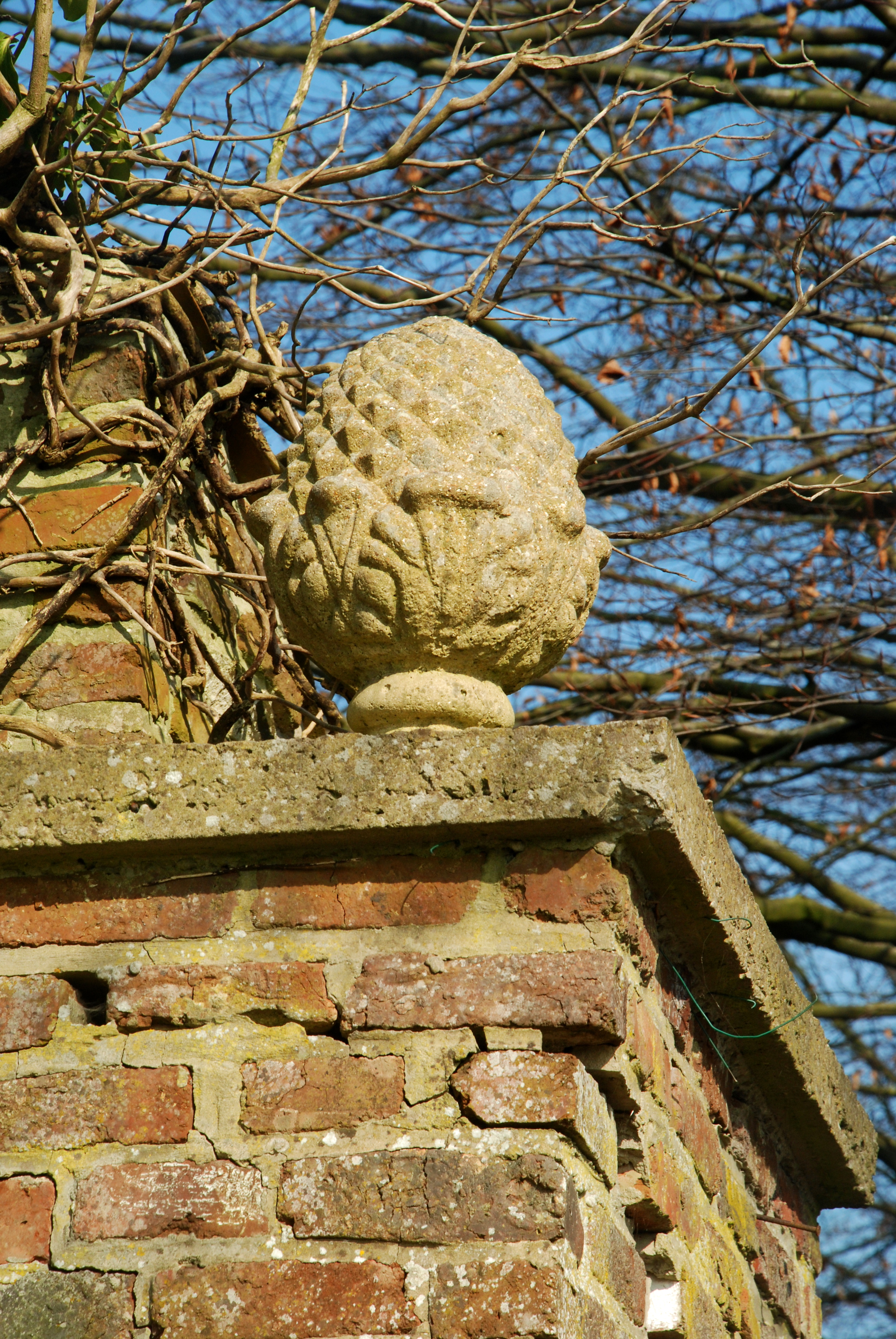 Belgique - Brabant wallon - Mur d'enceinte de l'abbaye de Villers-la-Ville